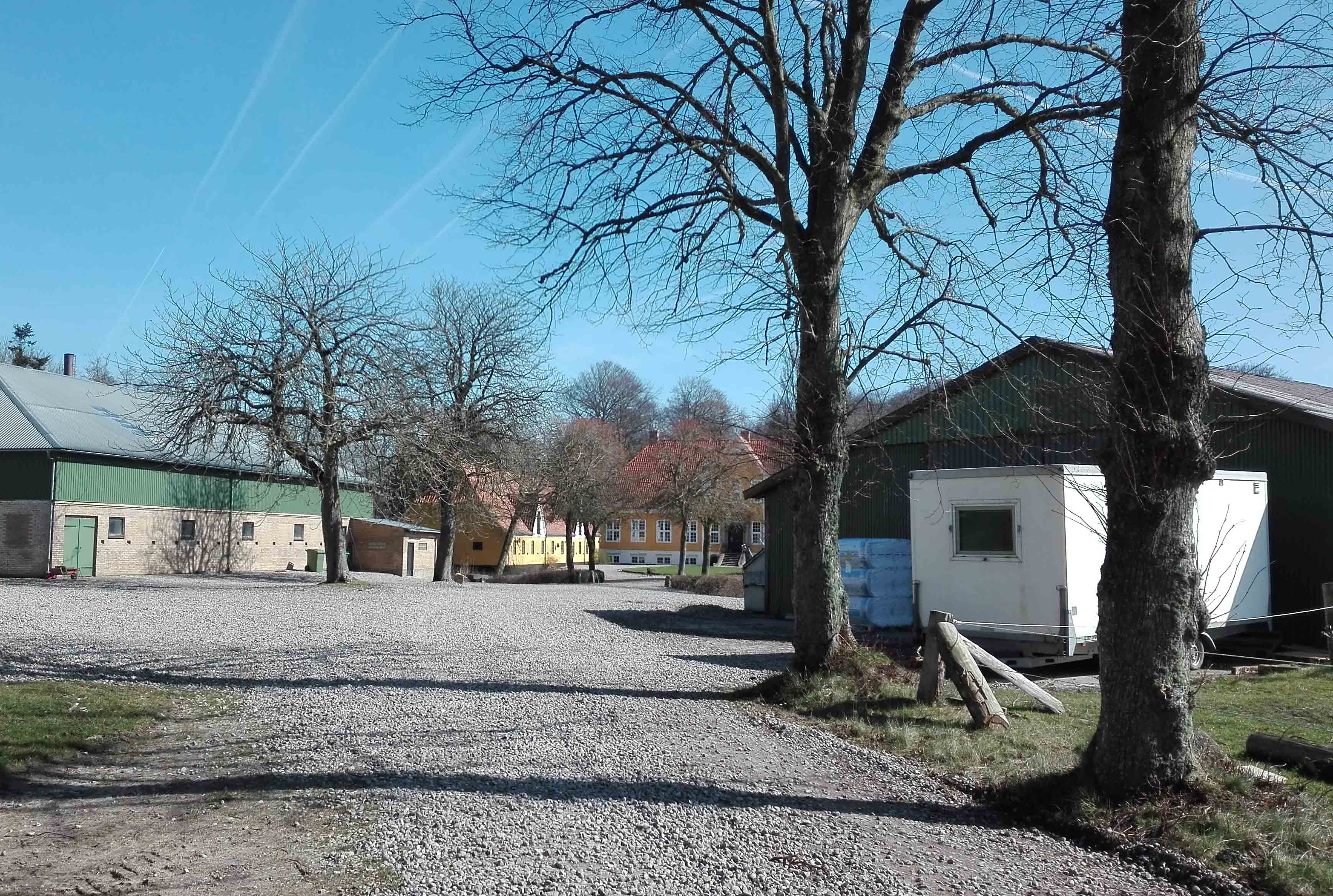 Hovedgården Skovbølgård